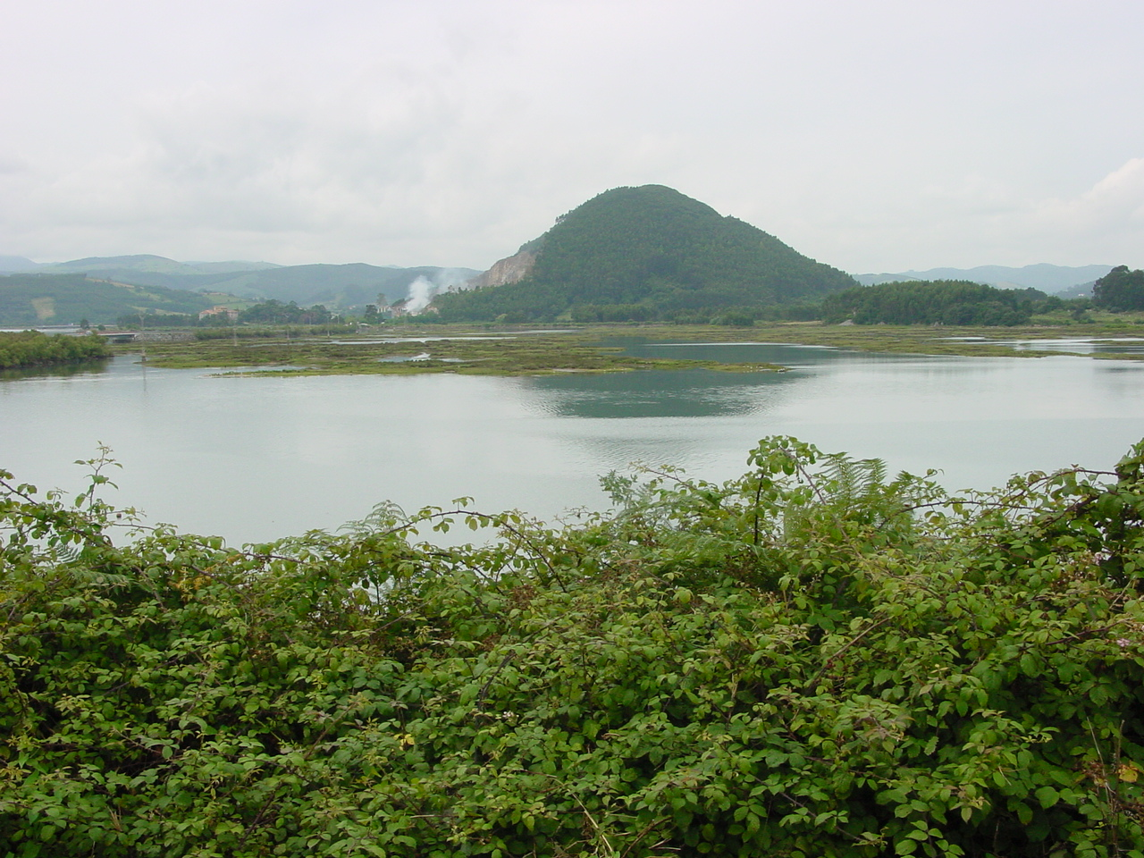 Santoña (Cantabria). Las marismas vistas desde Escalante. Al fondo el Montehano.